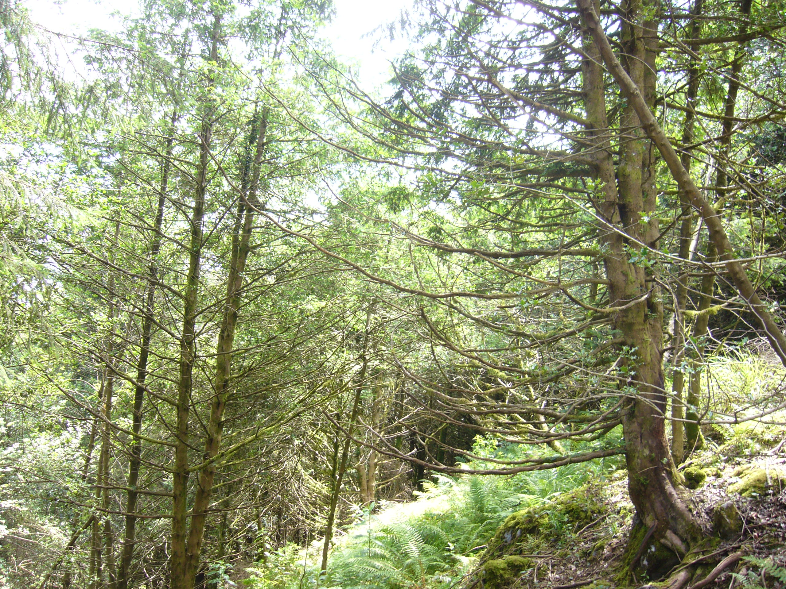 Hagin Baso gaztea Pagoeta Natura Parkean